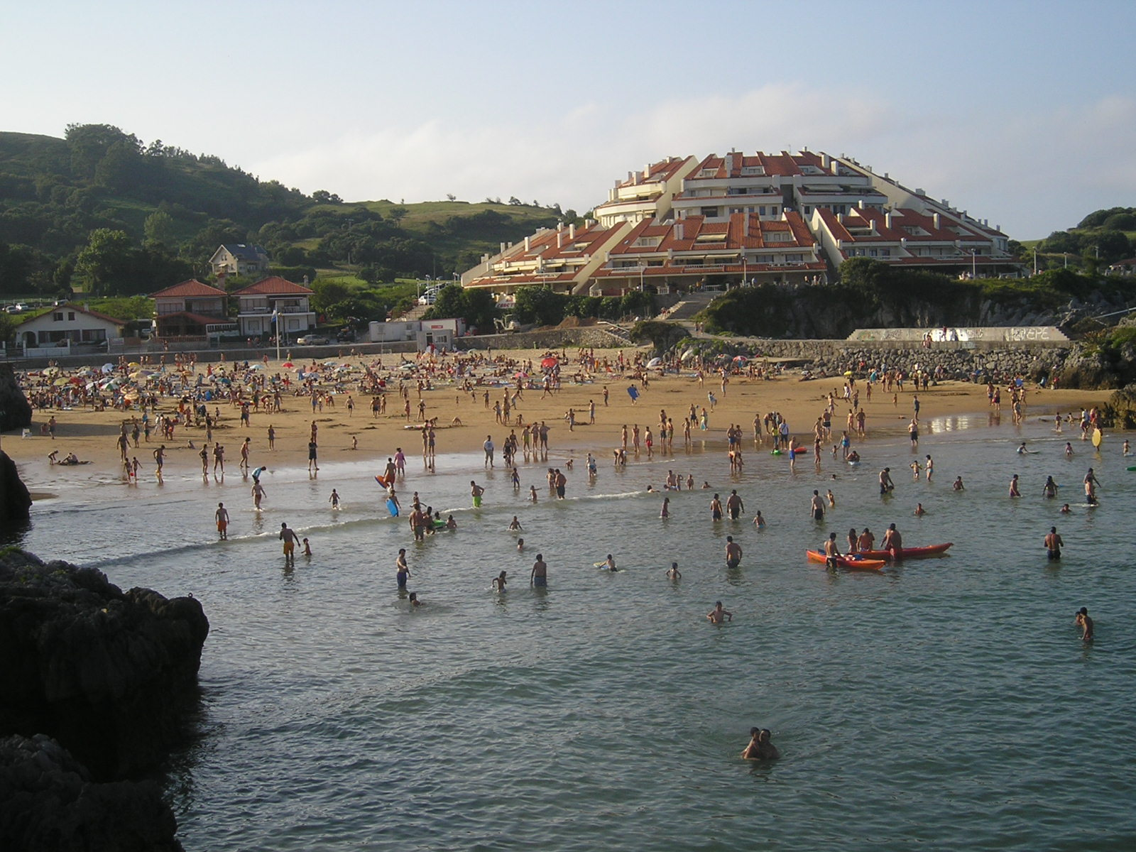 Localidad de Isla en Cantabria (España)